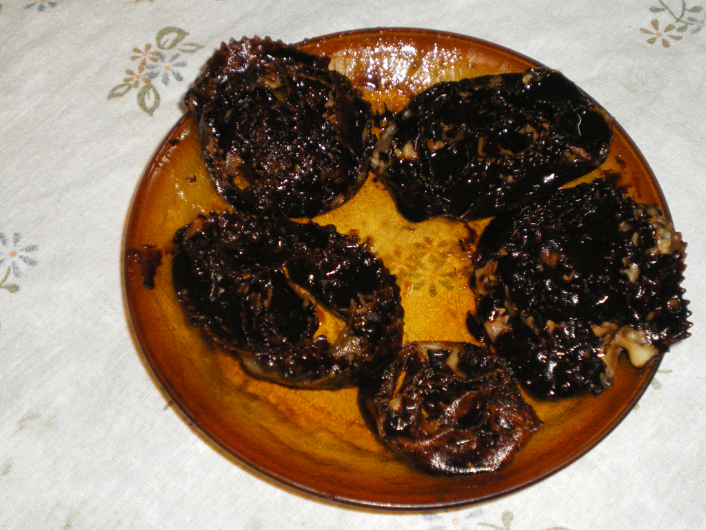 cartellate cerignolane al vino cotto